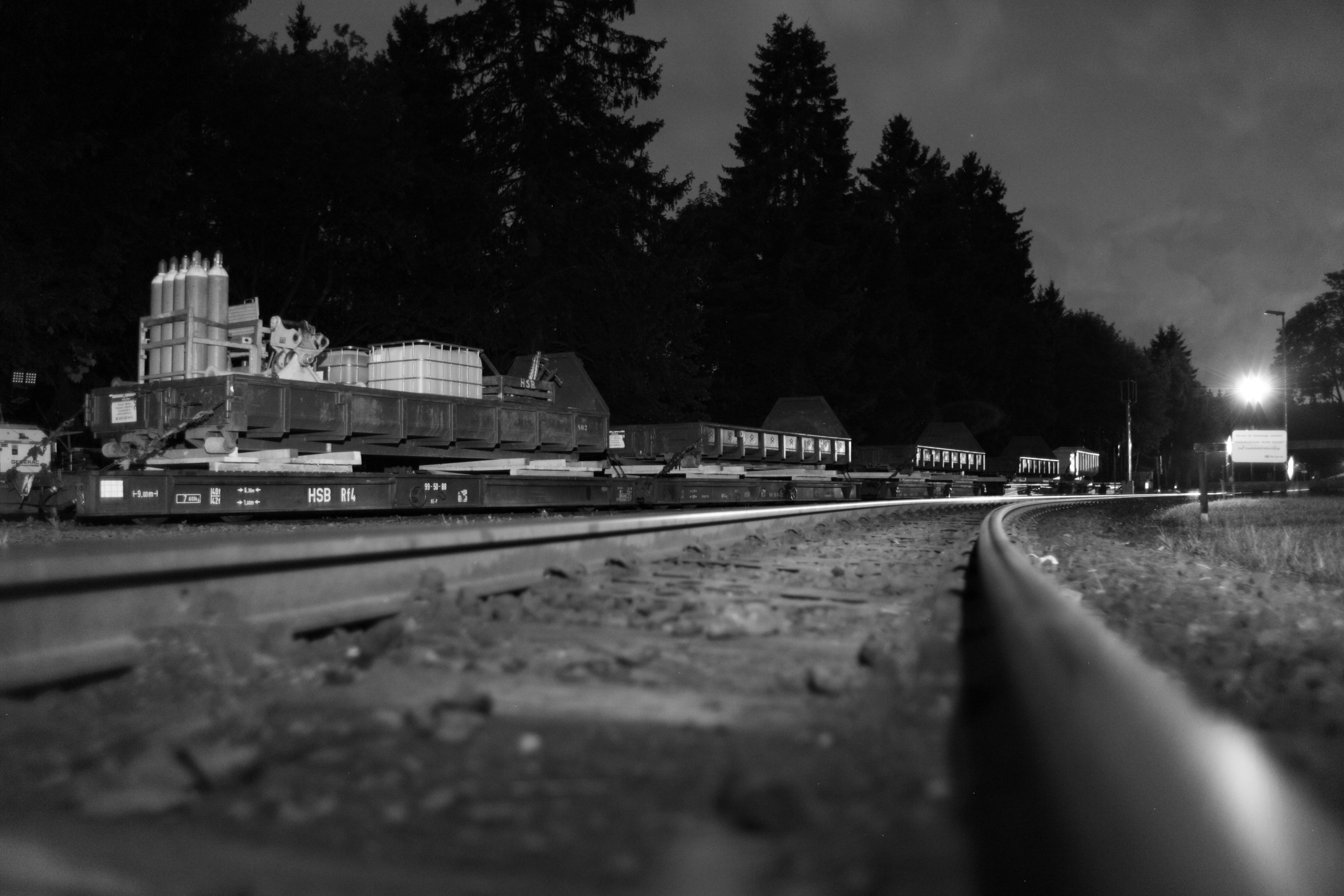 Ein Zug aus sechs Rollwagen der HSB. Außergewöhnich ist die Beladung mit fünf Abrollcontainern, welche auf Bohlen aufgebockt sind. Es handelt sich um einen Bauzug der im Bahnhof Drei Annen Hohne abgestellt wurde. Die Container gehören zur Firma "Trillhof".